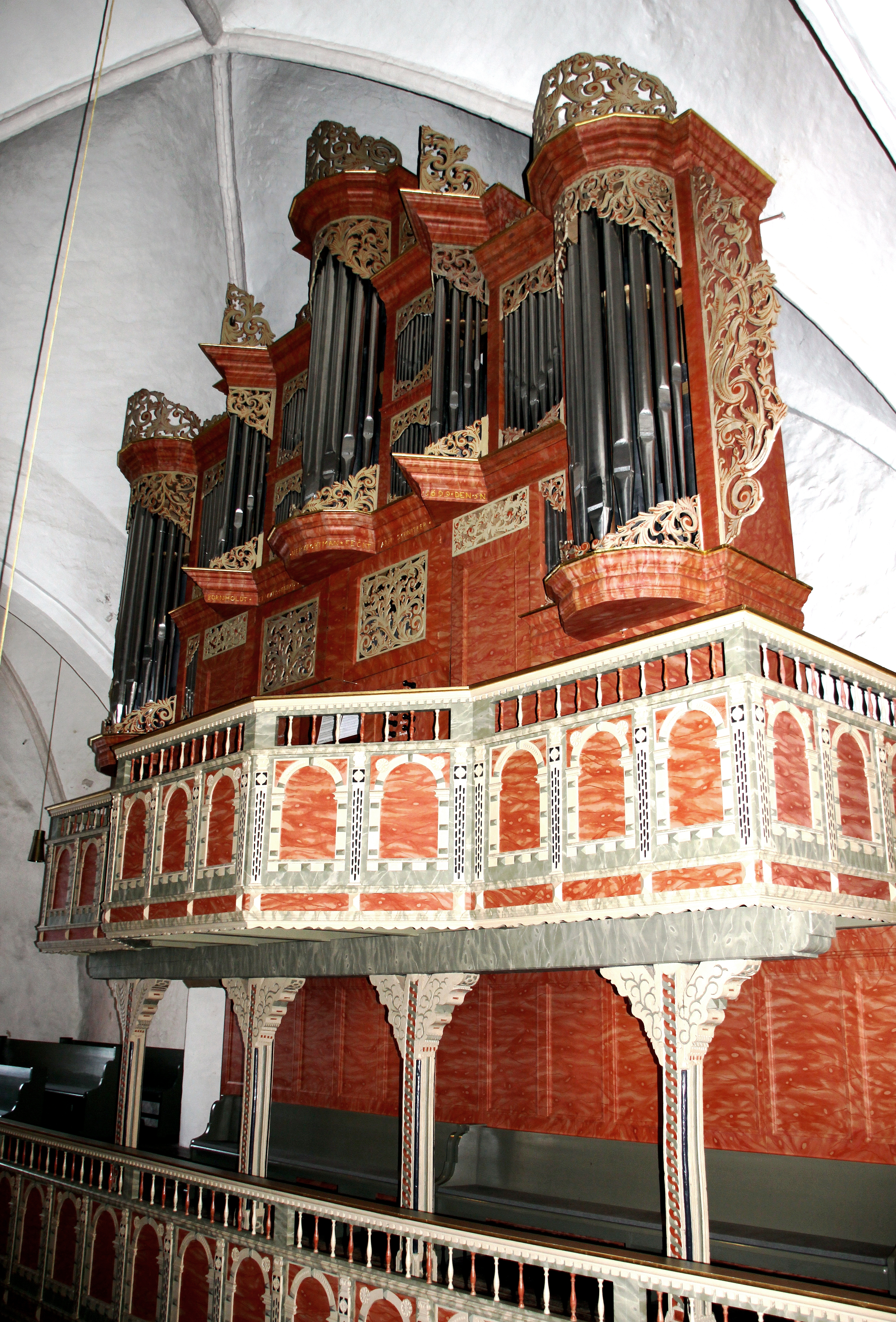 Kirche St. Cyprian und Cornelius Ganderkesee – Orgel Klaviatur